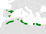 Chersophilus duponti distribution map, based on